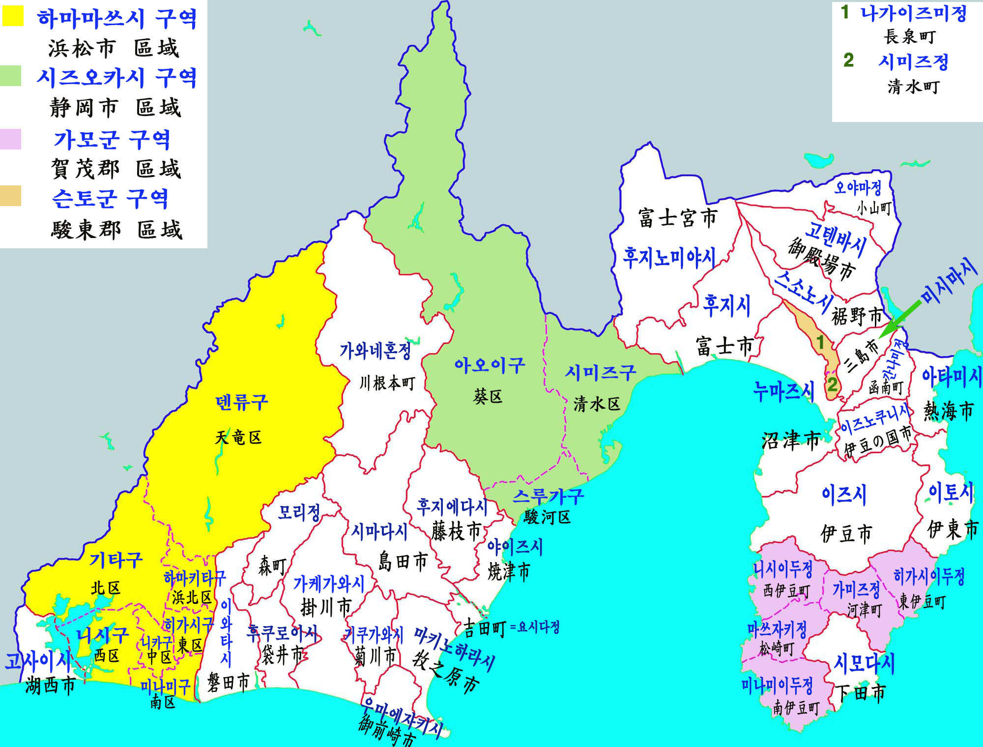 시즈오카현 행정구역